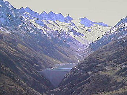 Lai da Curnera